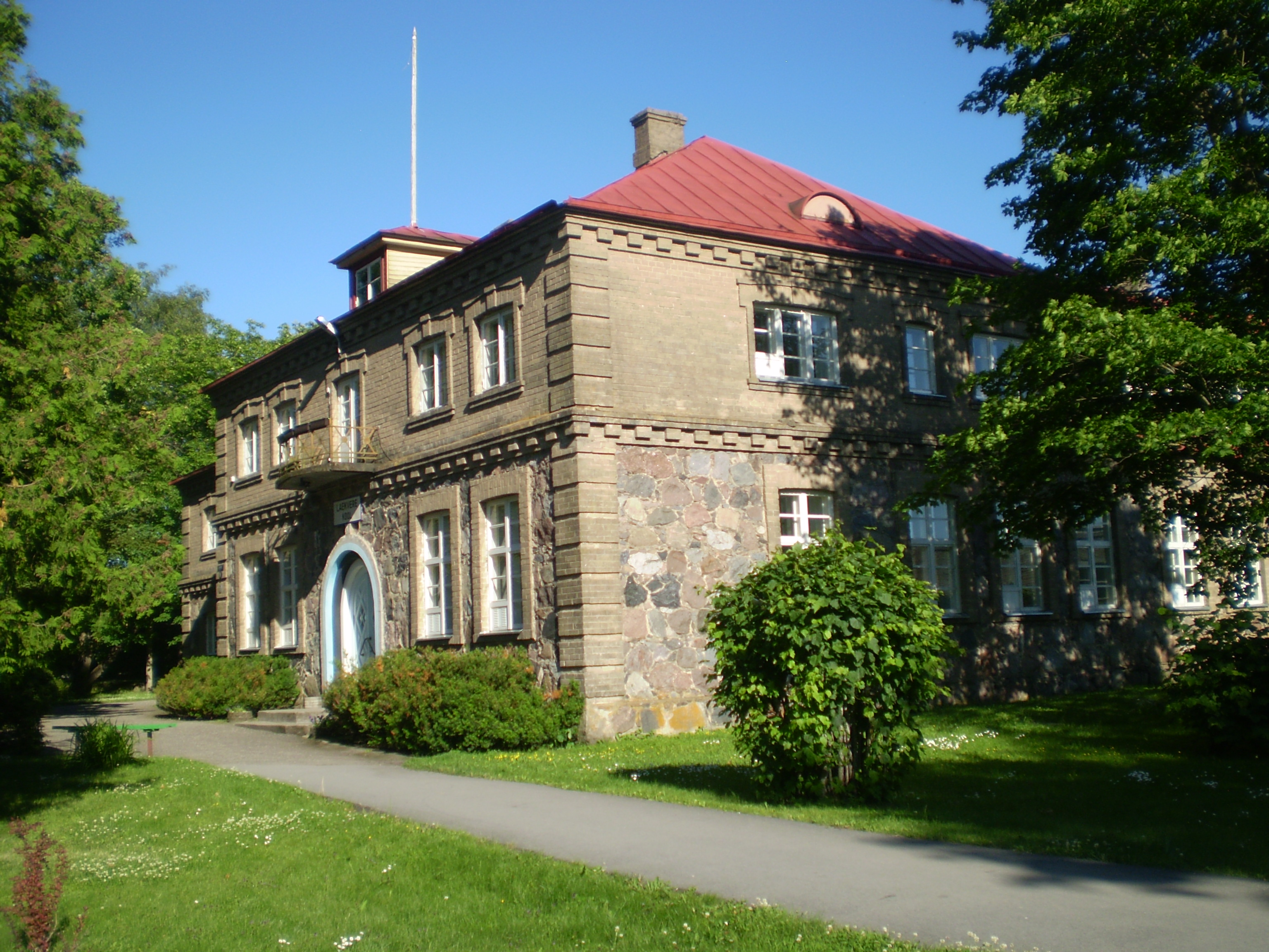 Laekvere koolihoone